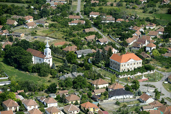 Jánoshidai légi fotó